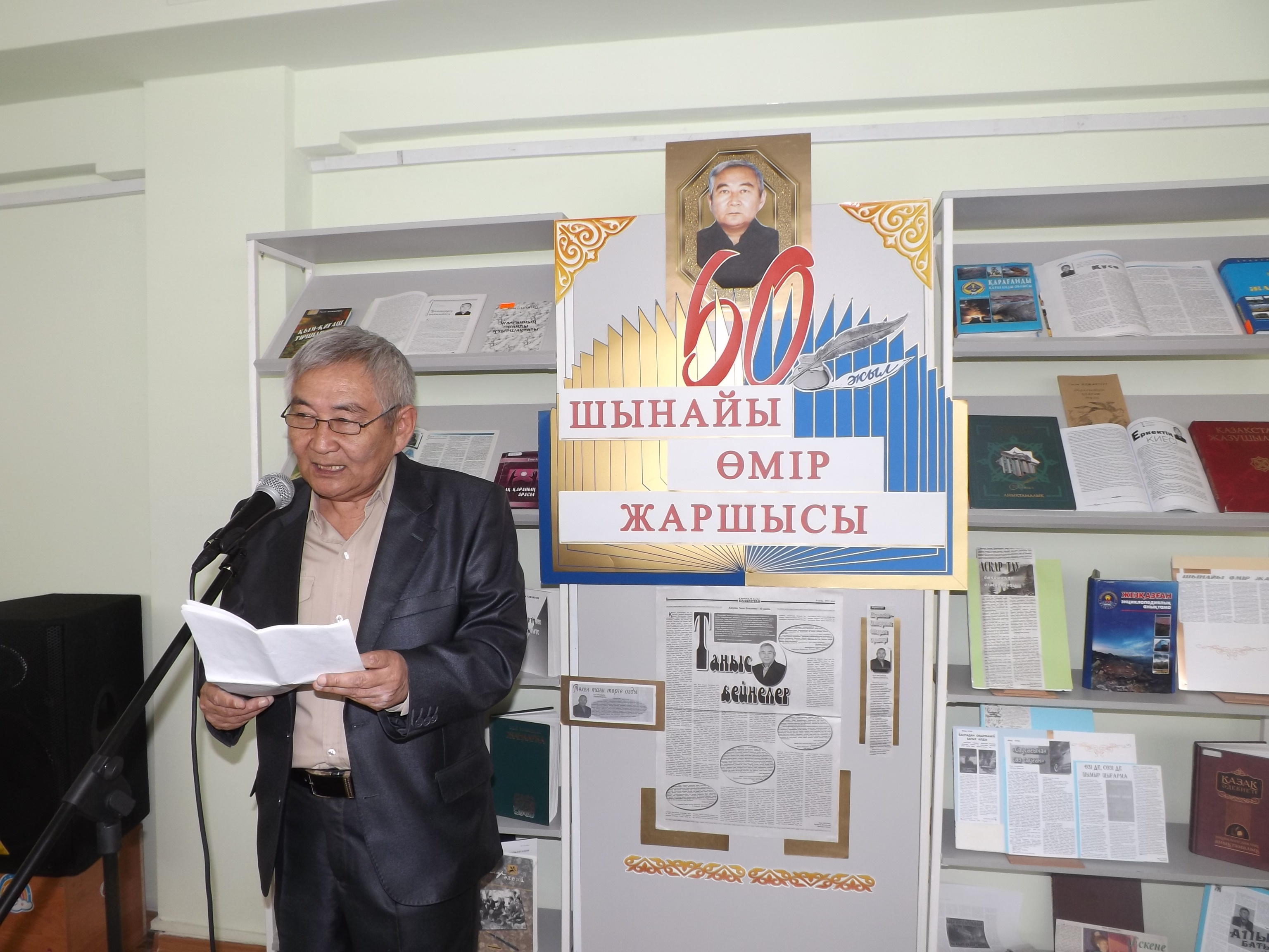 Оқырмандармен кездесуде